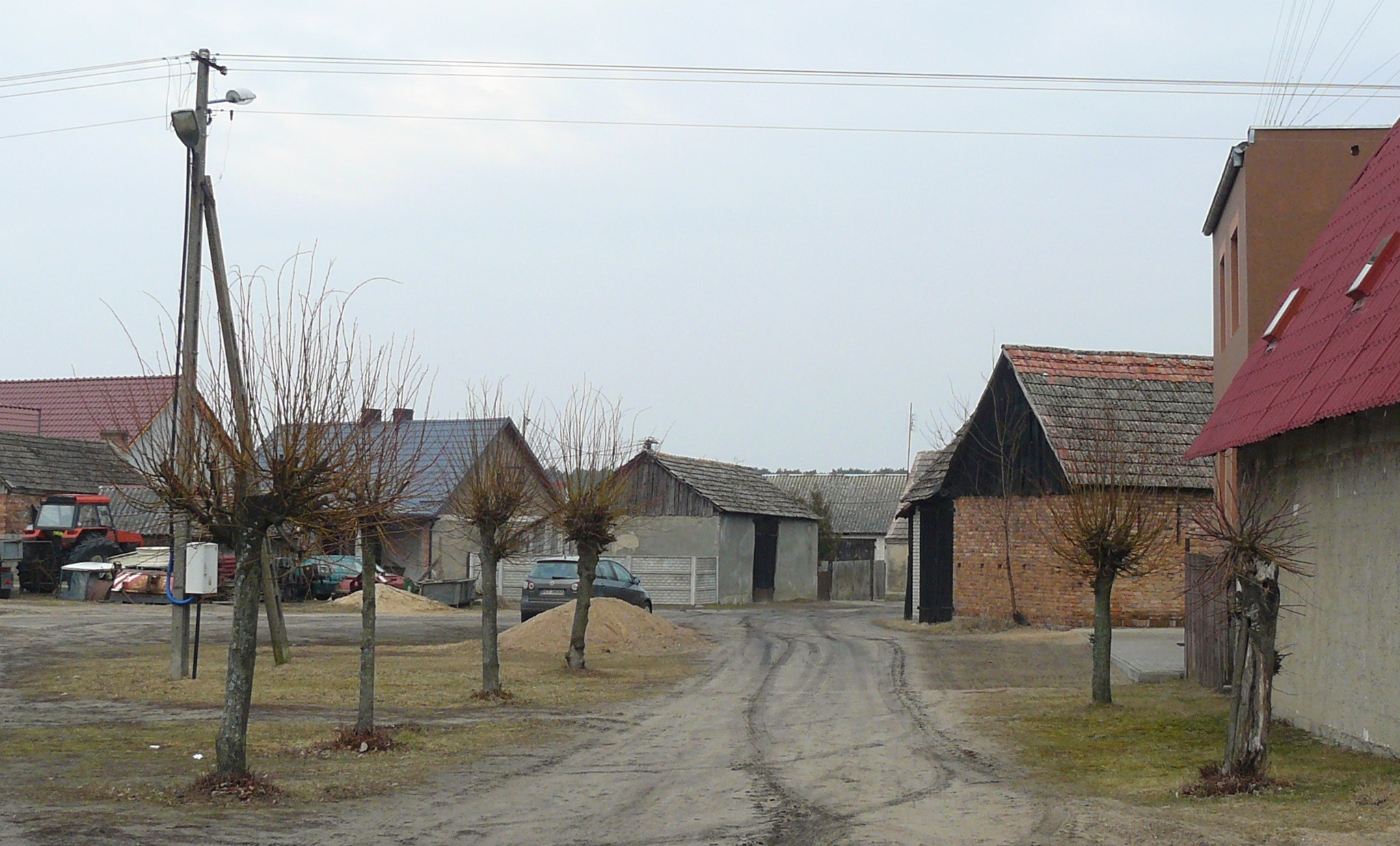 Biała w gm. Wieleń.